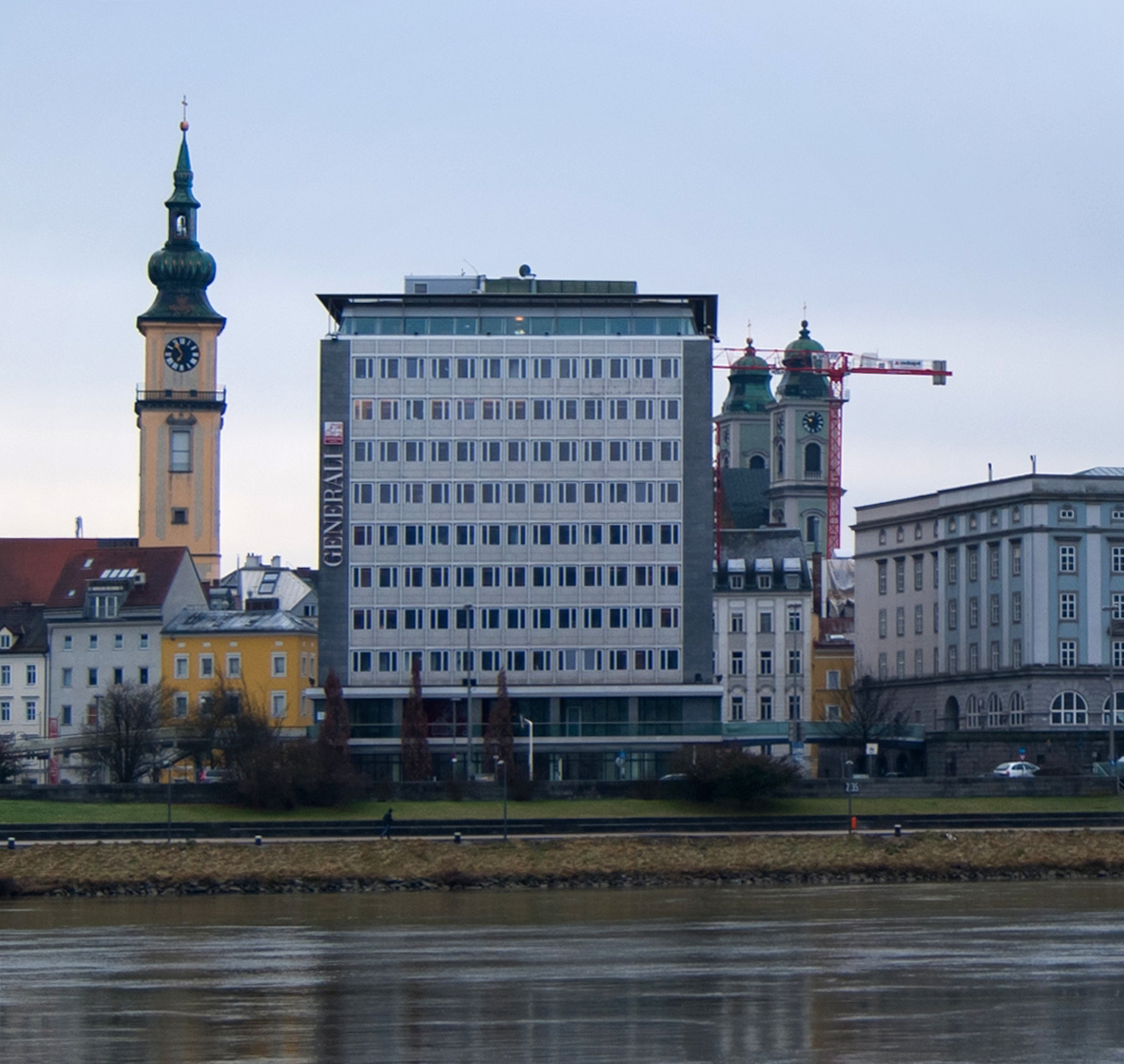 Das Generali-Gebäude in Linz, Adalbert-Stifter-Platz 2